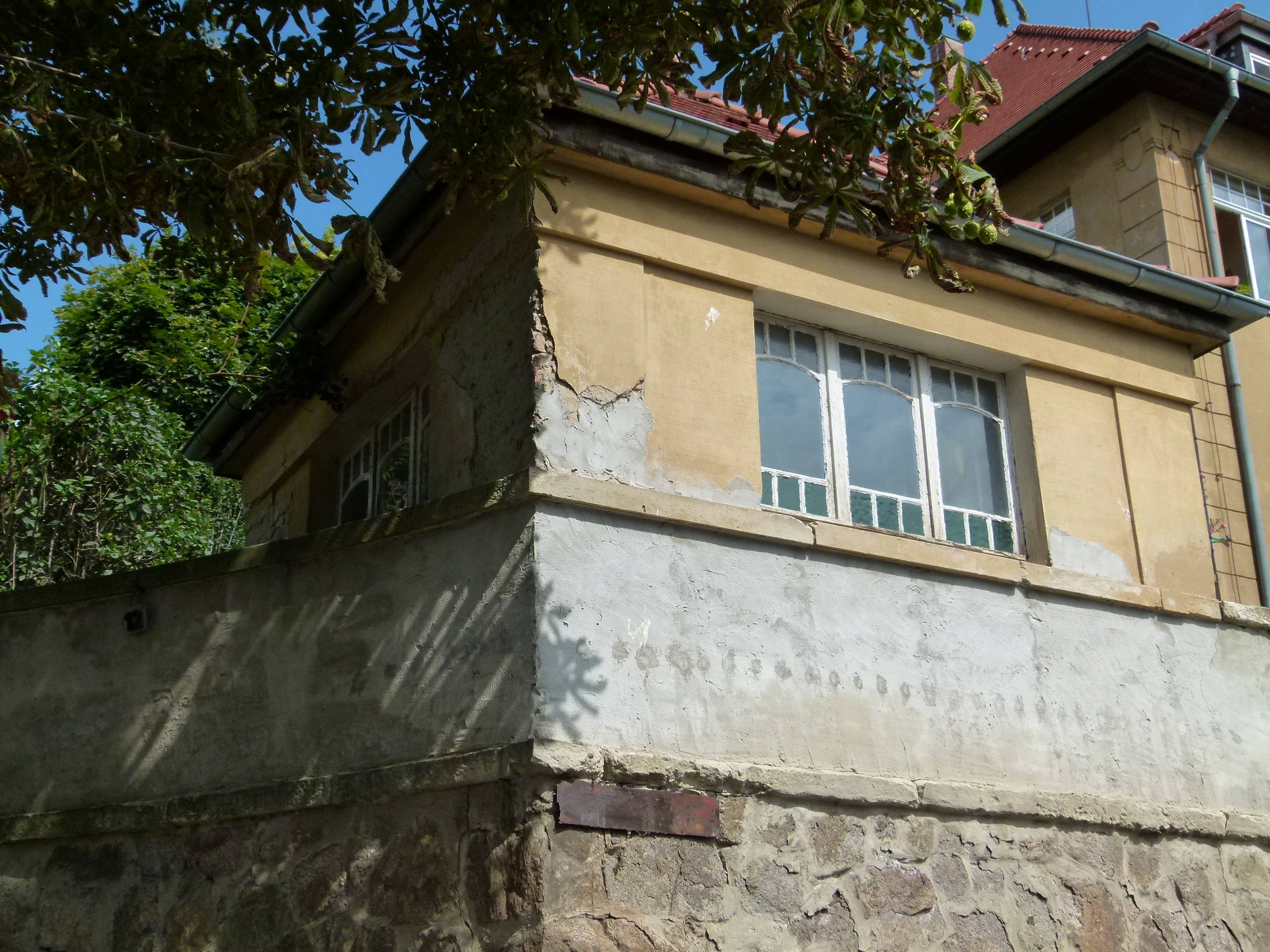 Gartenpavillon, Denkmalgeschütztes Haus, Am Goldenen Wagen 12, Radebeul, Sachsen